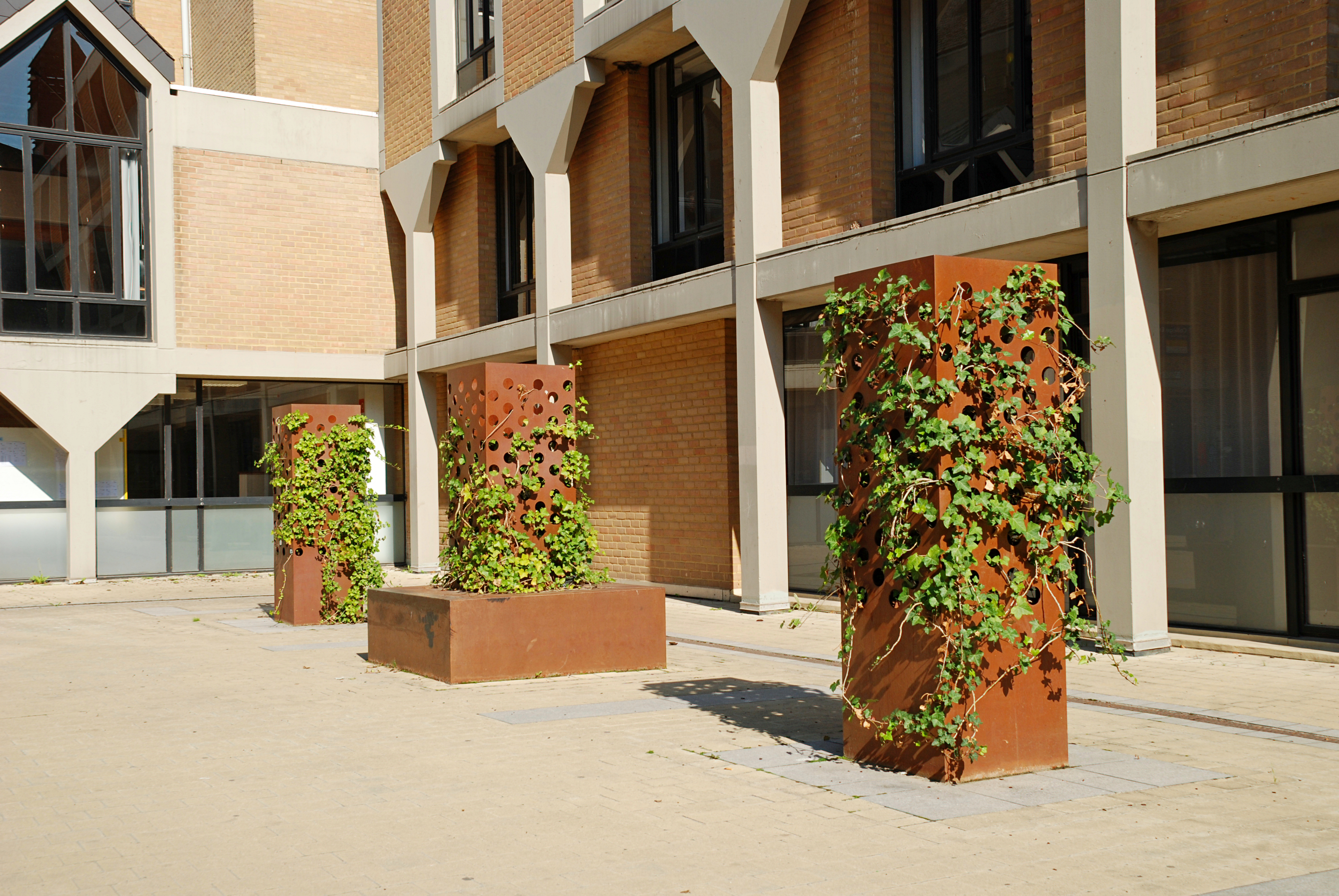 Belgique - Louvain-la-Neuve - Collège Érasme (ancien Musée de Louvain-la-Neuve) This photo of immovable heritage has been taken in the Walloon Region